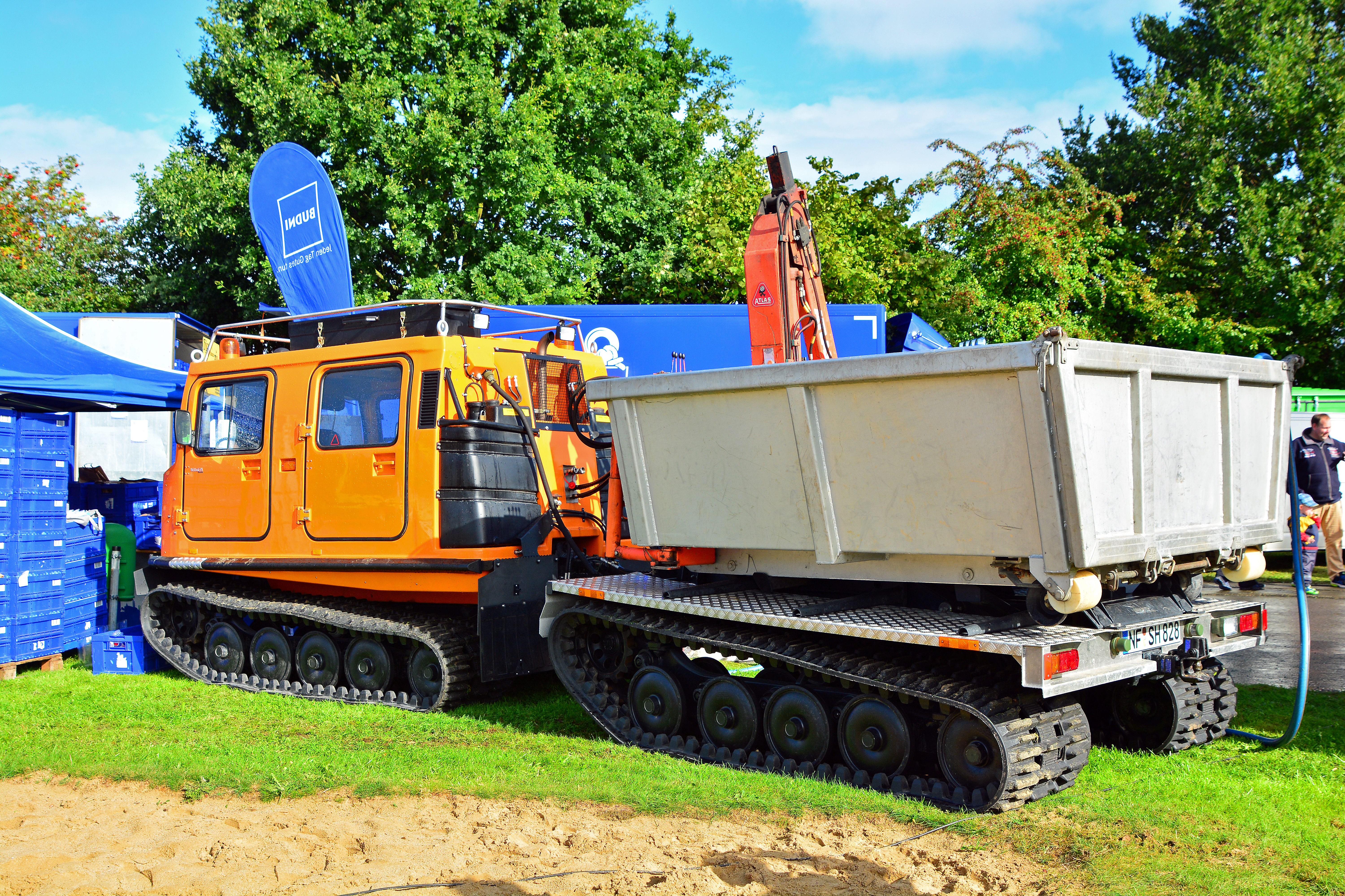 Hägglungs- Raupenfahrzeug bei Appen musiziert 2015